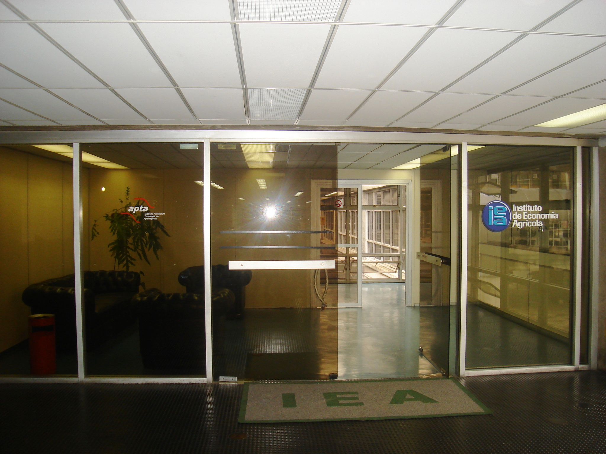 Entrada do IEA